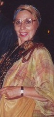 Alice Sapritch, actrice française.